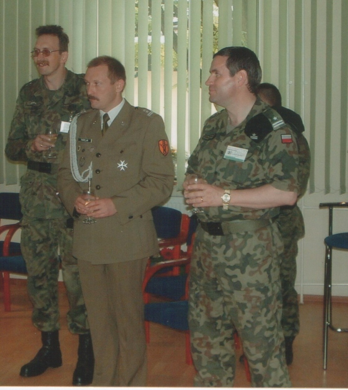 Pożegnanie dowódcy batalionu czołgów 6BKPanc - ppłk Dariusz Parylak